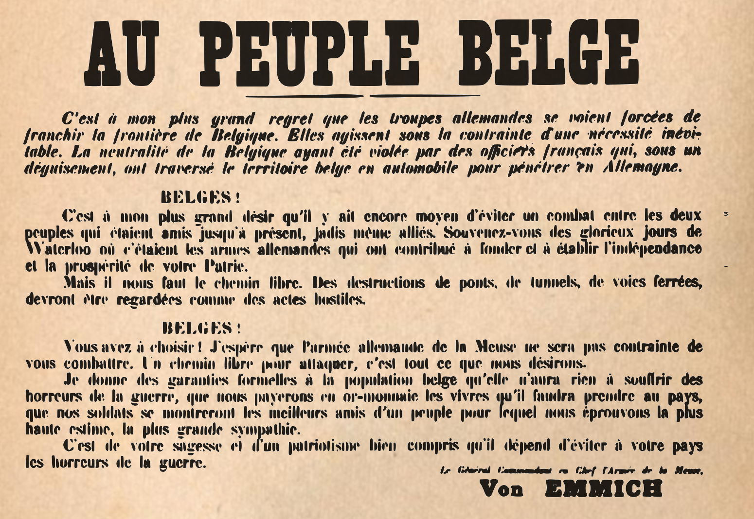 Ultimatum allemands - 3 août 1914 - Otto Von Emmich